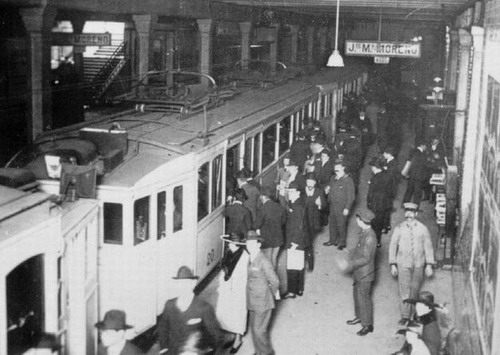 Coche 20 de la primera serie en estación José María Moreno (actual Acoyte) de la línea A. Se observan ventanillas originales y algunas modificadas